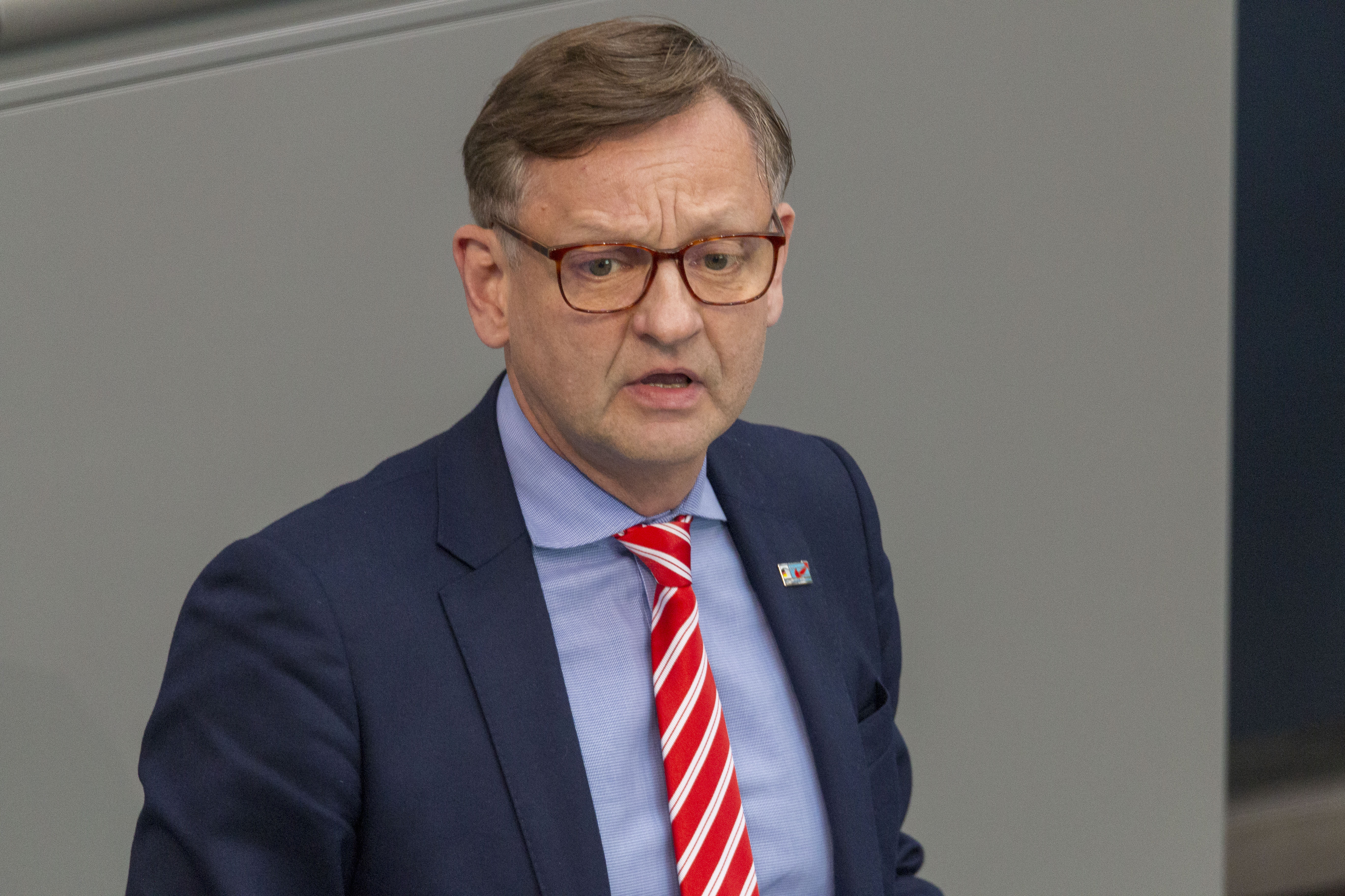 Kay Gottschalk, Bundestagsabgeordneter der AfD während der Plenarsitzung des Deutschen Bundestages am 2. Juli 2020 in Berlin.